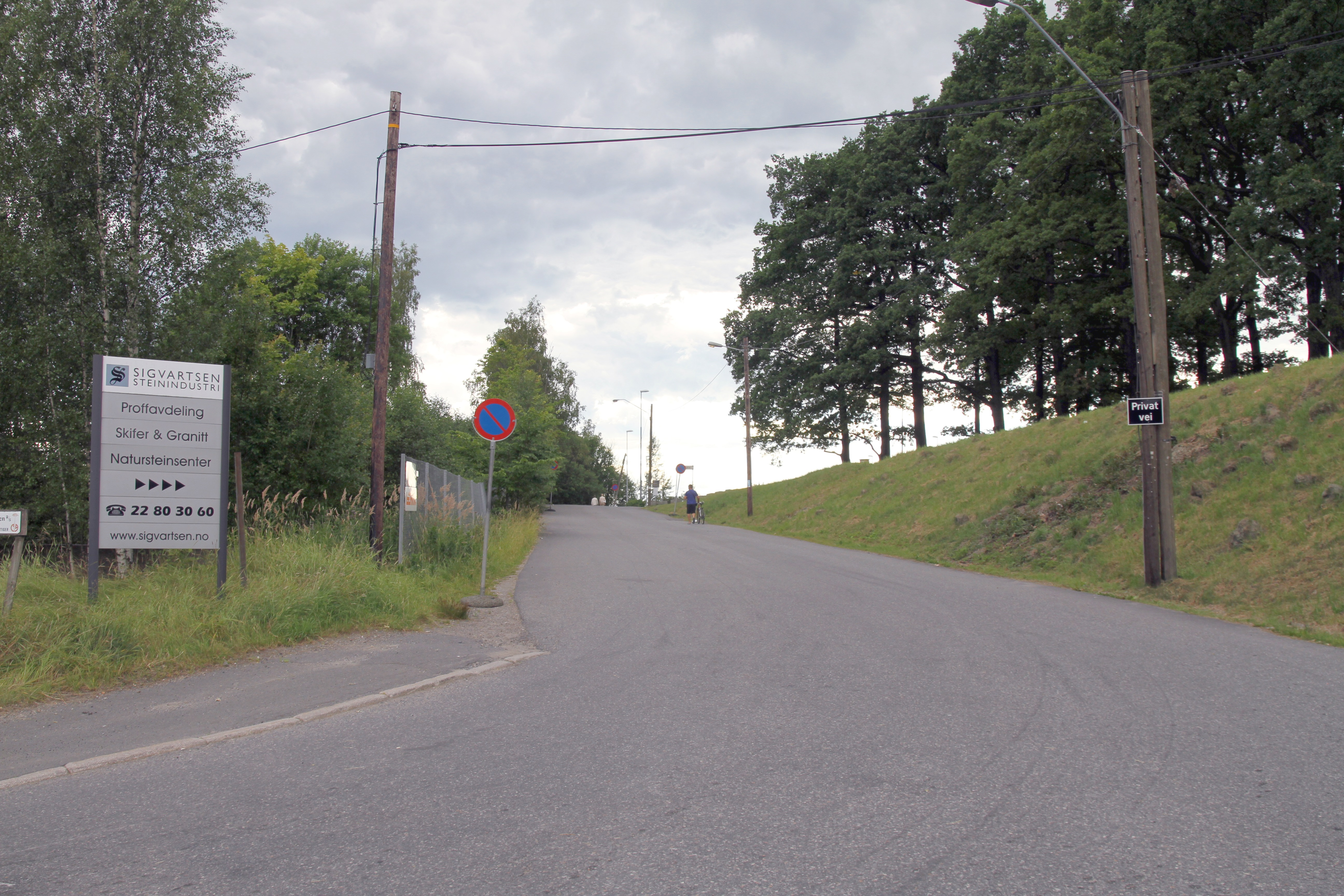 Brubakkveien i Oslo